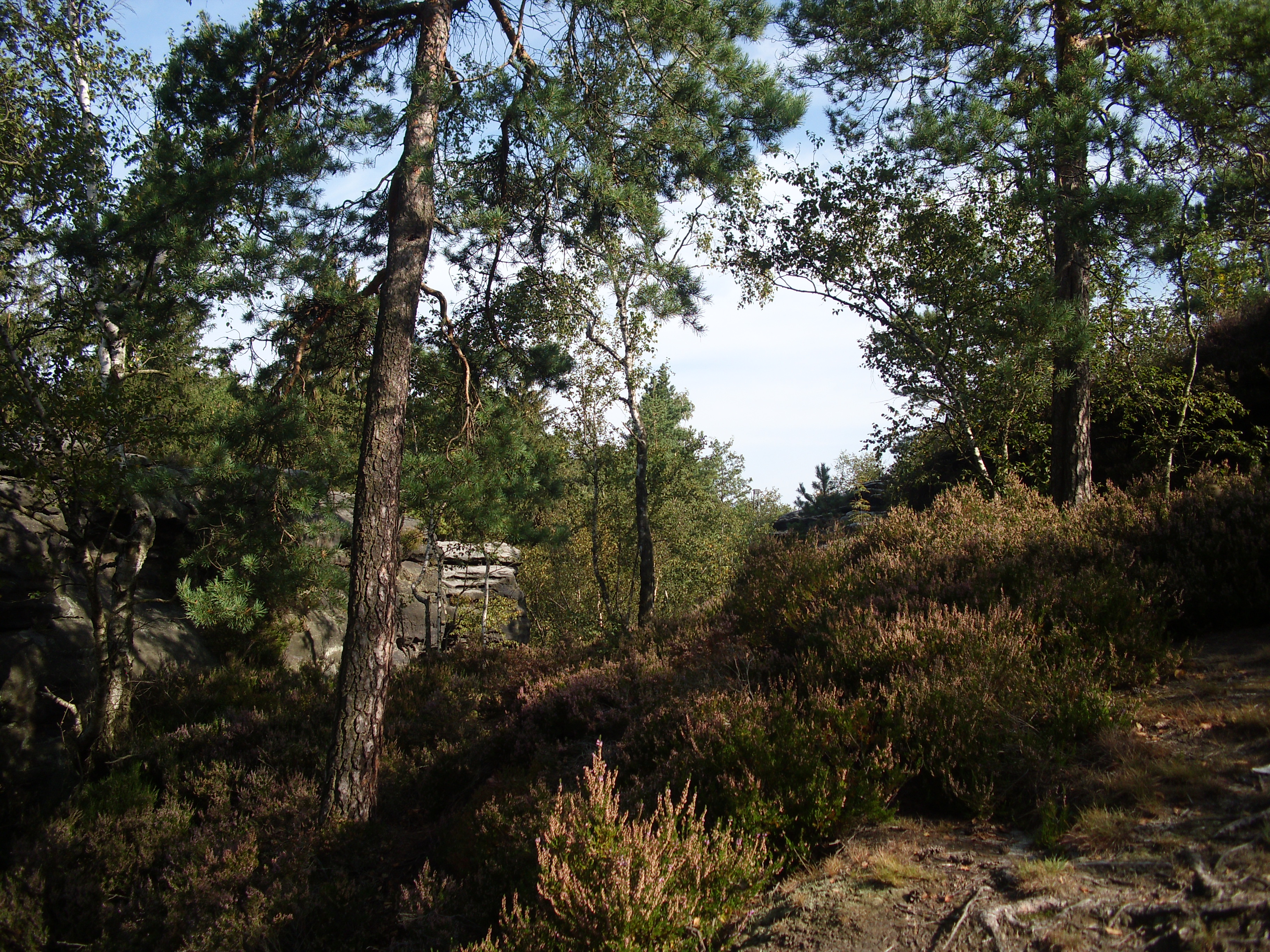 Ein Typischer Vertreter der Flora zumindest im südlichen Teil des Plateaus